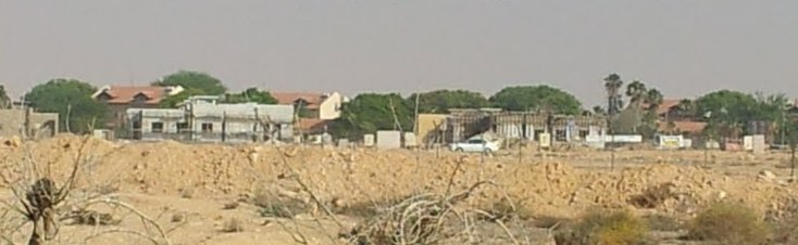 Kibbutz Tlalim in the Negev desert, Israel קיבוץ טללים בנגב, ישראל